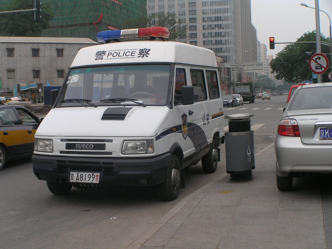 北京公安的南京依维柯警车